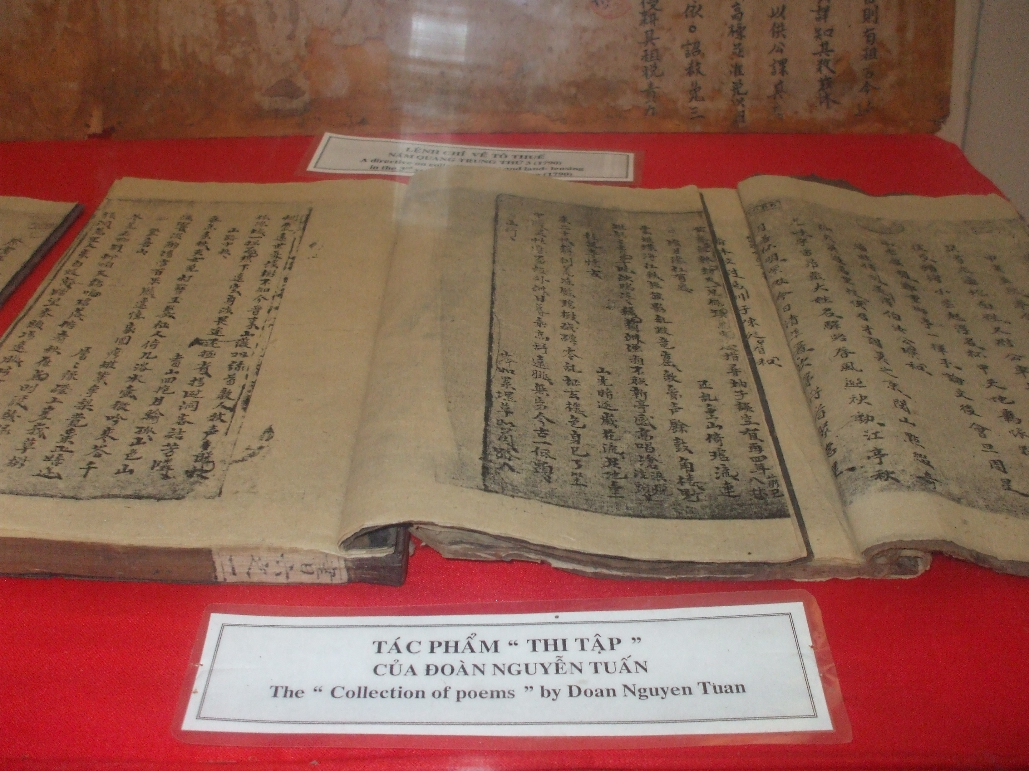 Tác phẩm "Thi tập" của Đoàn Nguyễn Tuấn đang được trưng bày trong Bảo tàng Quang Trung (Bình Định, Việt Nam).